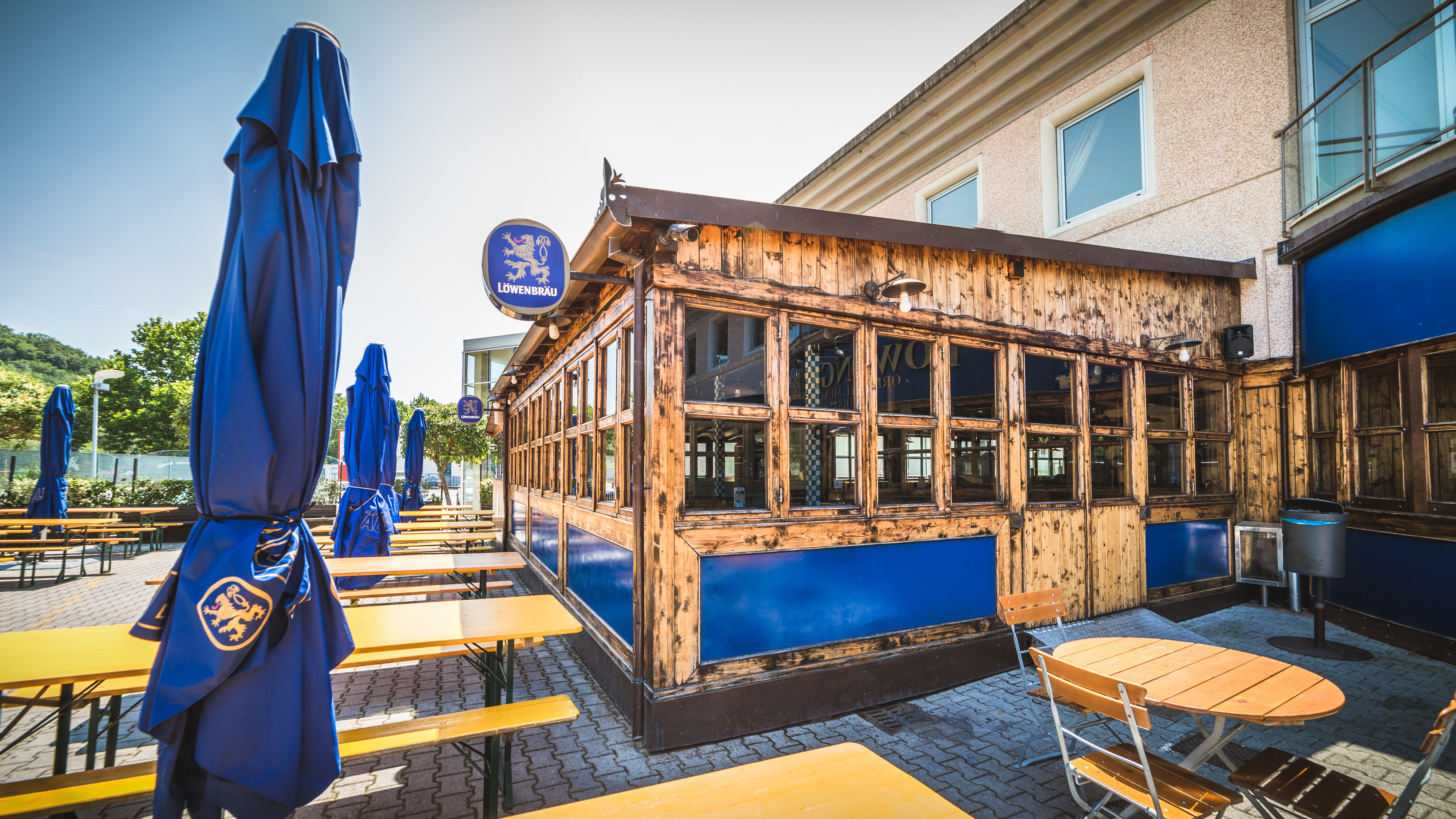 Löwengrube Limite